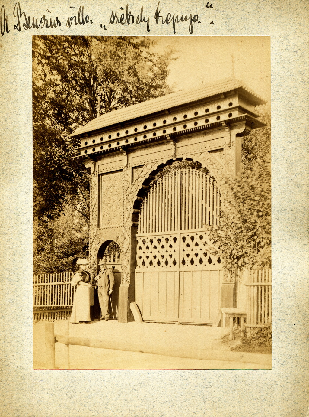 Székelykapu Benczúr Gyula egykori nyaralója előtt, Ambachban